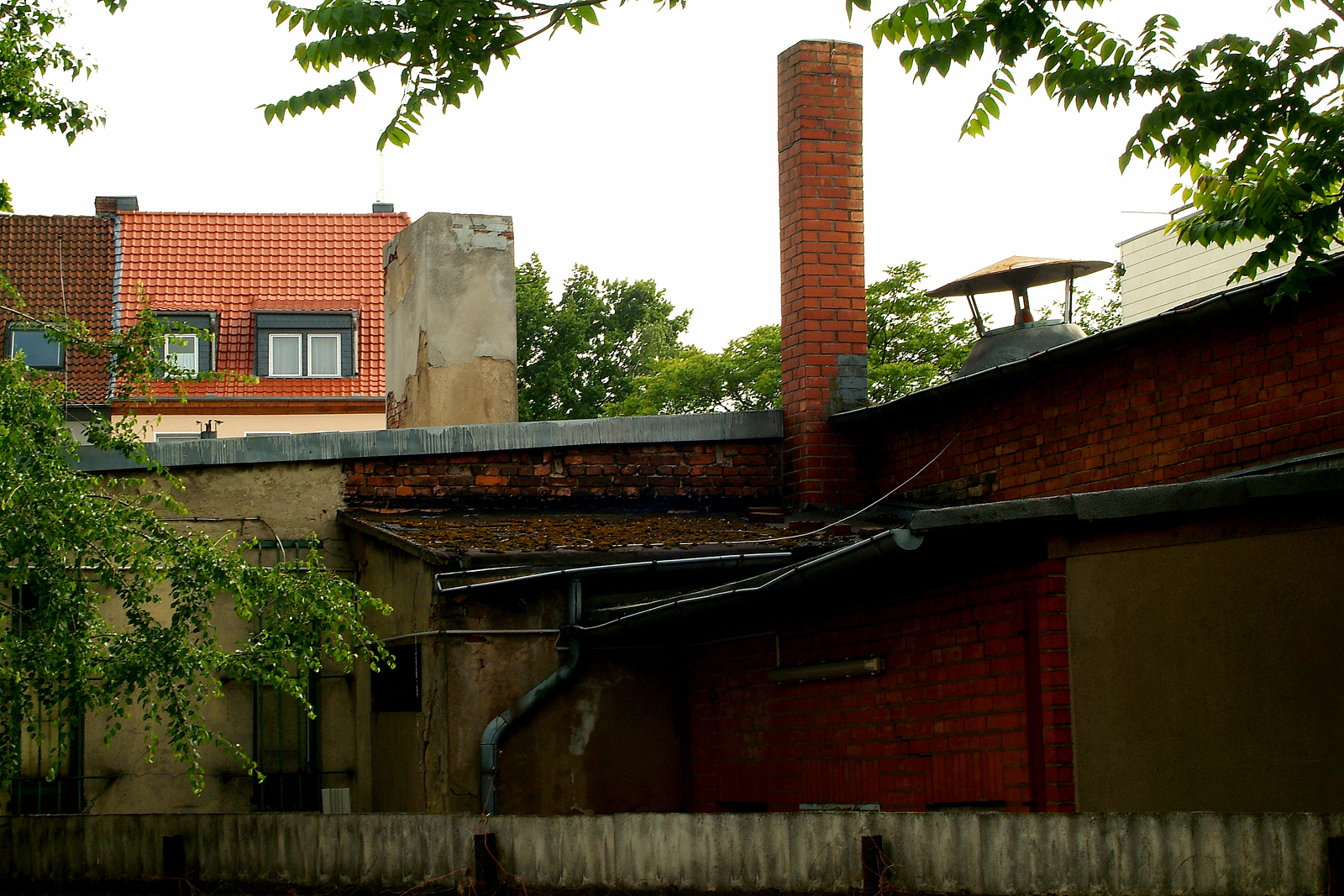 Blick von der Seitenstraße am Hauptgüterbahnhof Hannover in Richtung Engelbosteler Damm über das Dach der ehemaligen Wilh. Boetticher, mechanische Weberei und Kleiderfabrik, in Hannover, Weidendamm 6 ...